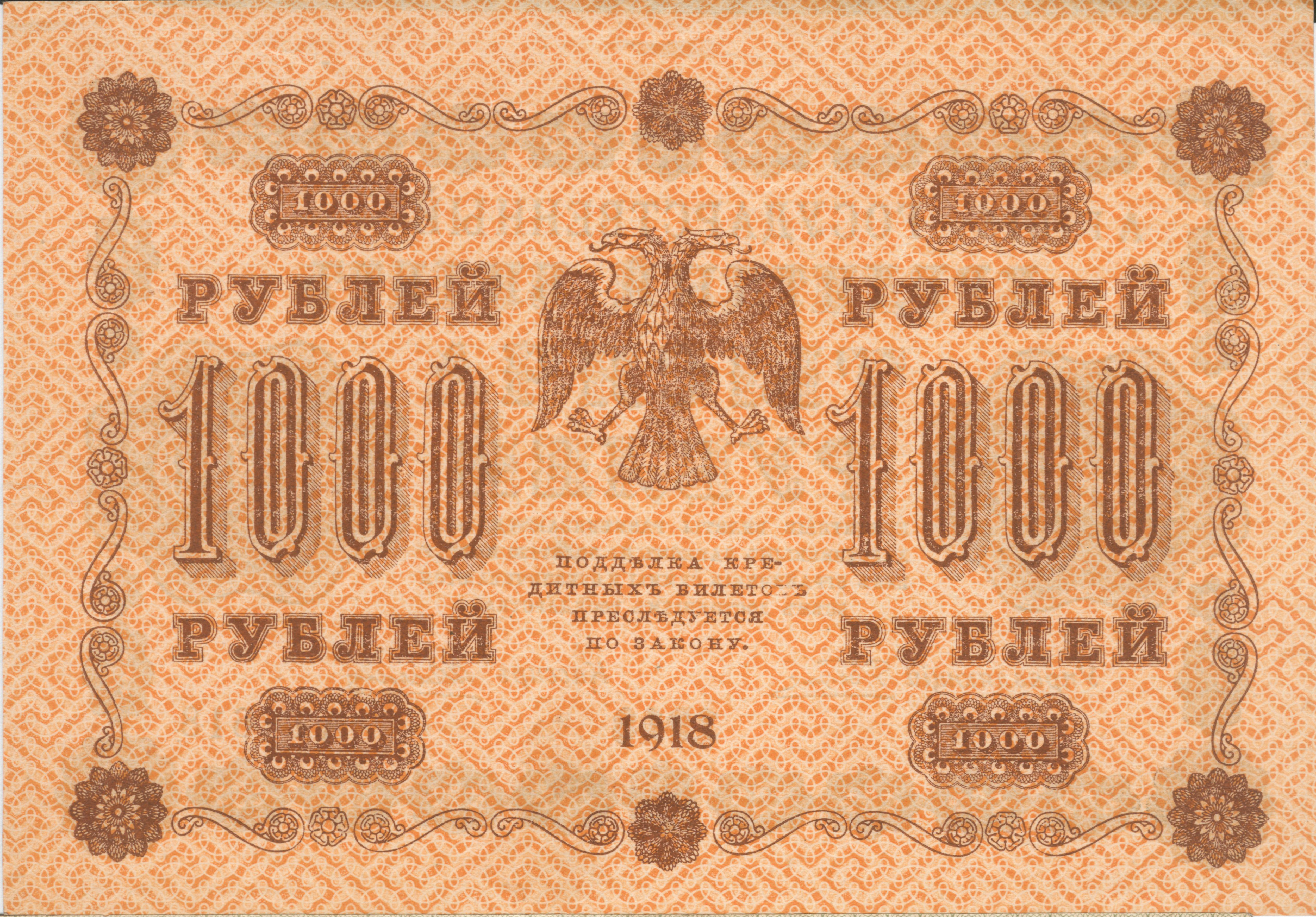 1000 рублей несуществующего Временного правительства 1918 года._Реверс